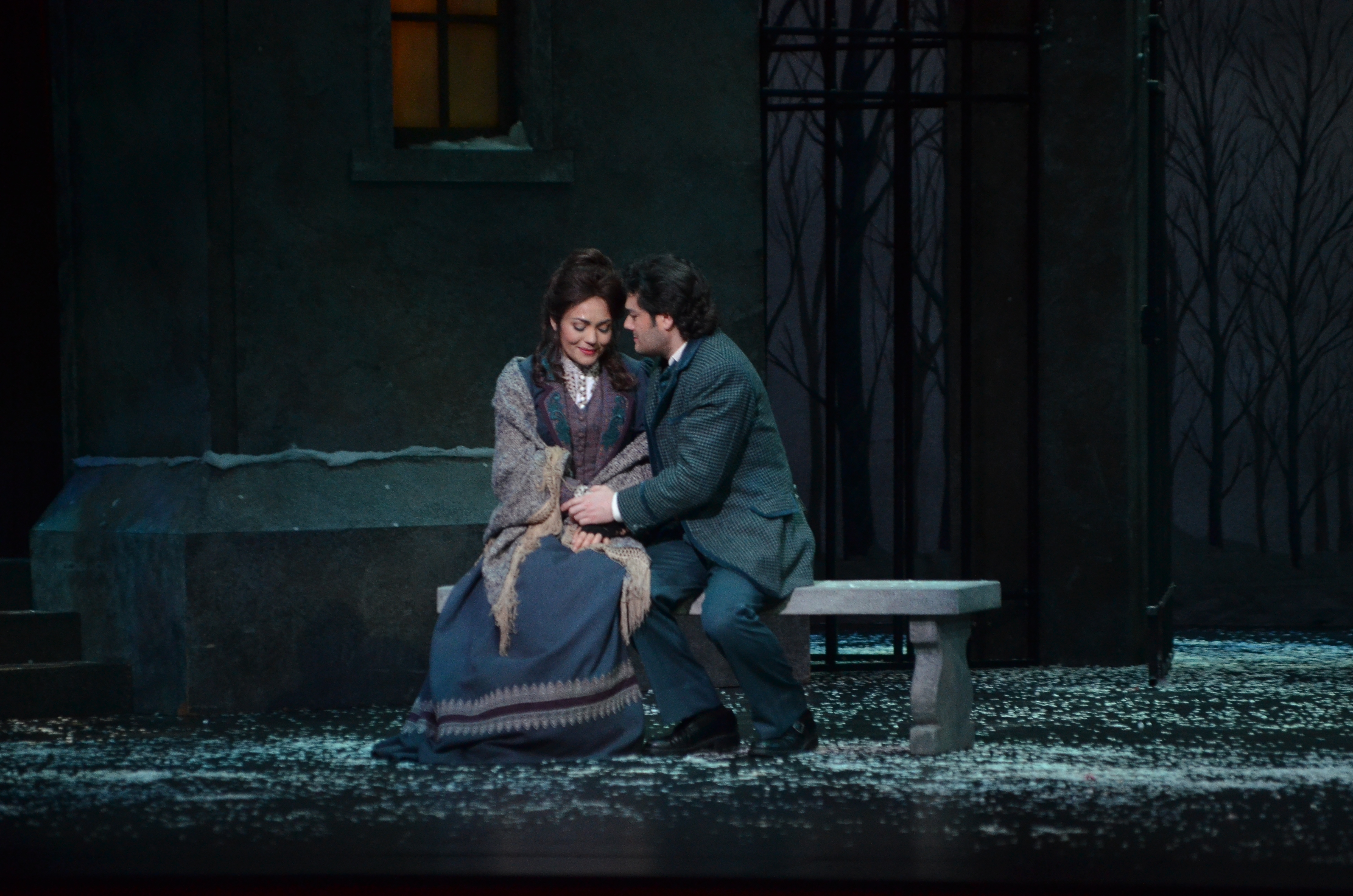 Act III - Ailyn Pérez as Mimì and Arturo Chacón-Cruz as Rodolfo - FGO La bohème 2012 - Photo by Gaston de Cardenas